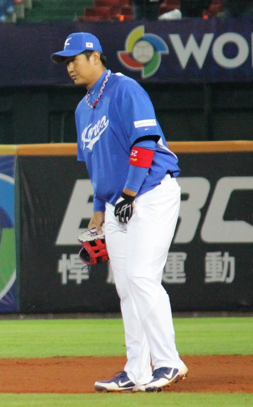 Dae-Ho Lee